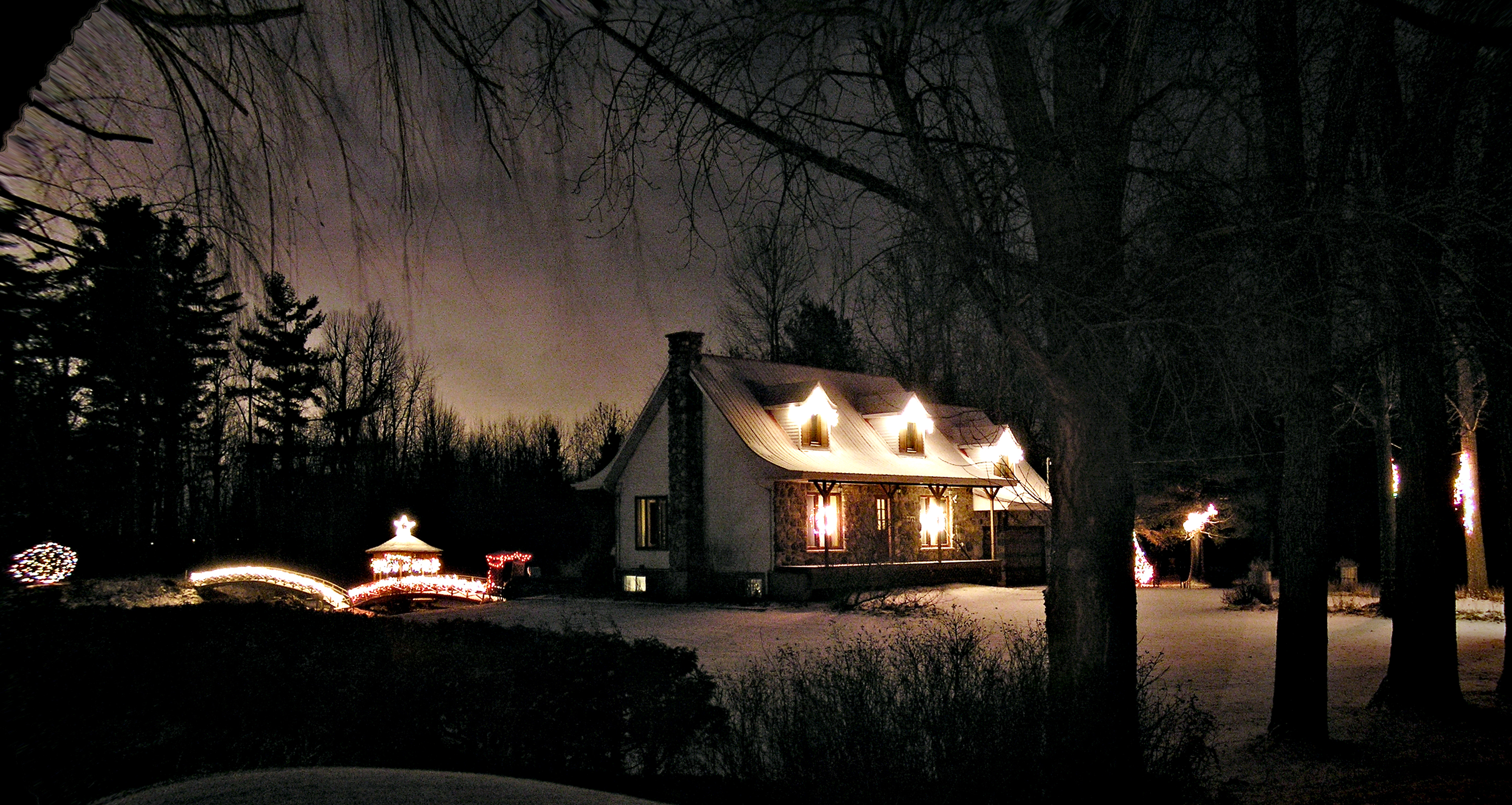 Mont-Saint-Grégoire (Québec) - Illuminations de fin d'année 2005